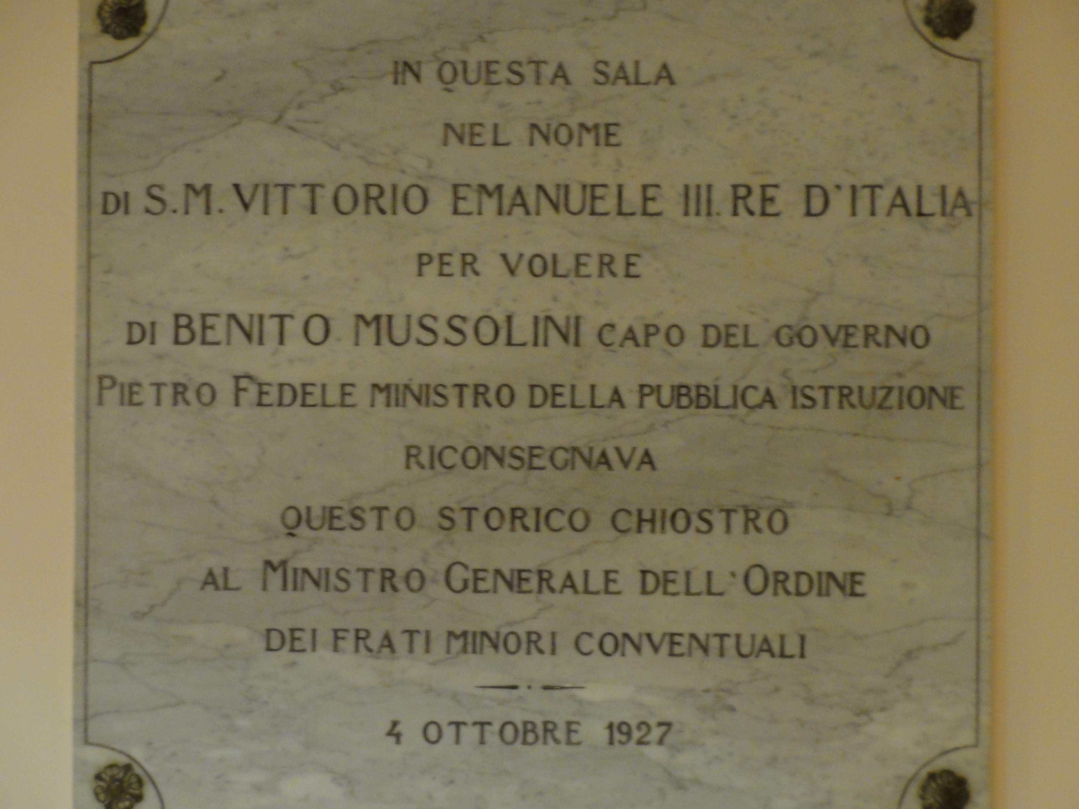 Assisi, Sacro Convento, Sede dalla Cappella Musicale, lapide commemorativa della restituzione all'Ordine dei Frati Minori Conventuali del Sacro Convento il 4 ottobre 1927